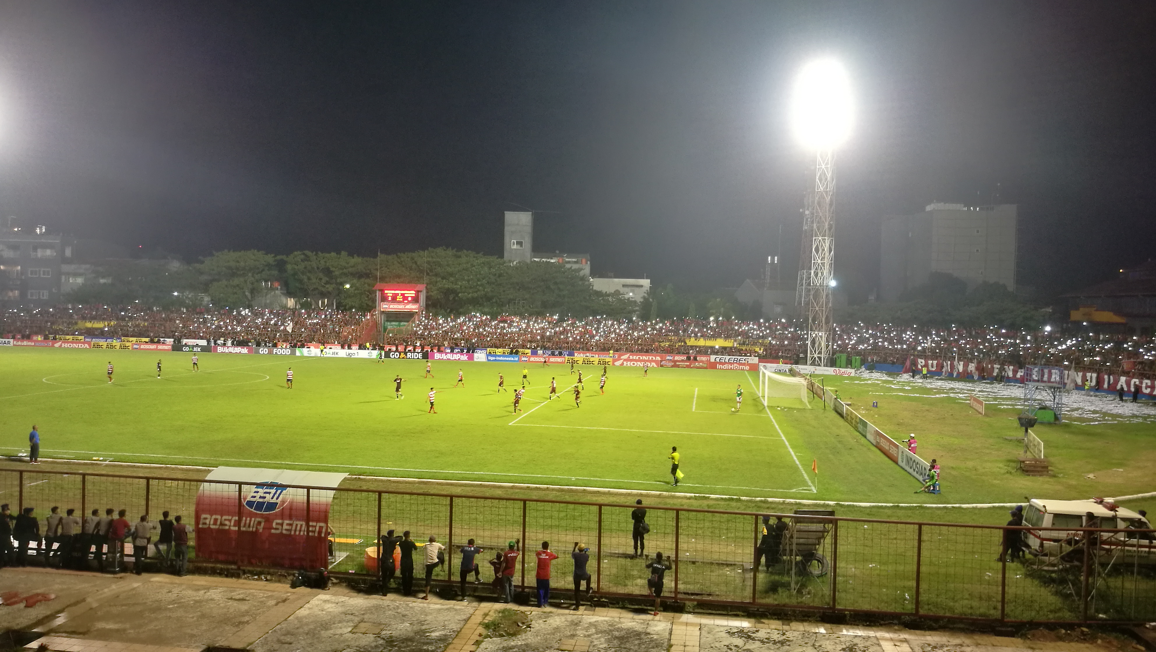 Suasana pertandingan PSM VS Madura United, 30/05/2018